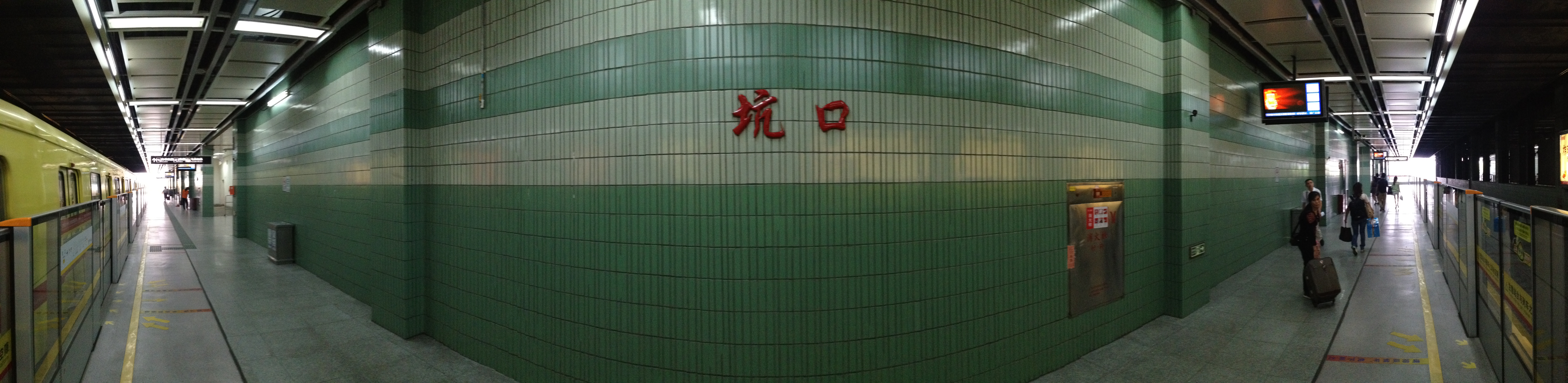 广州地铁坑口站月台全景图